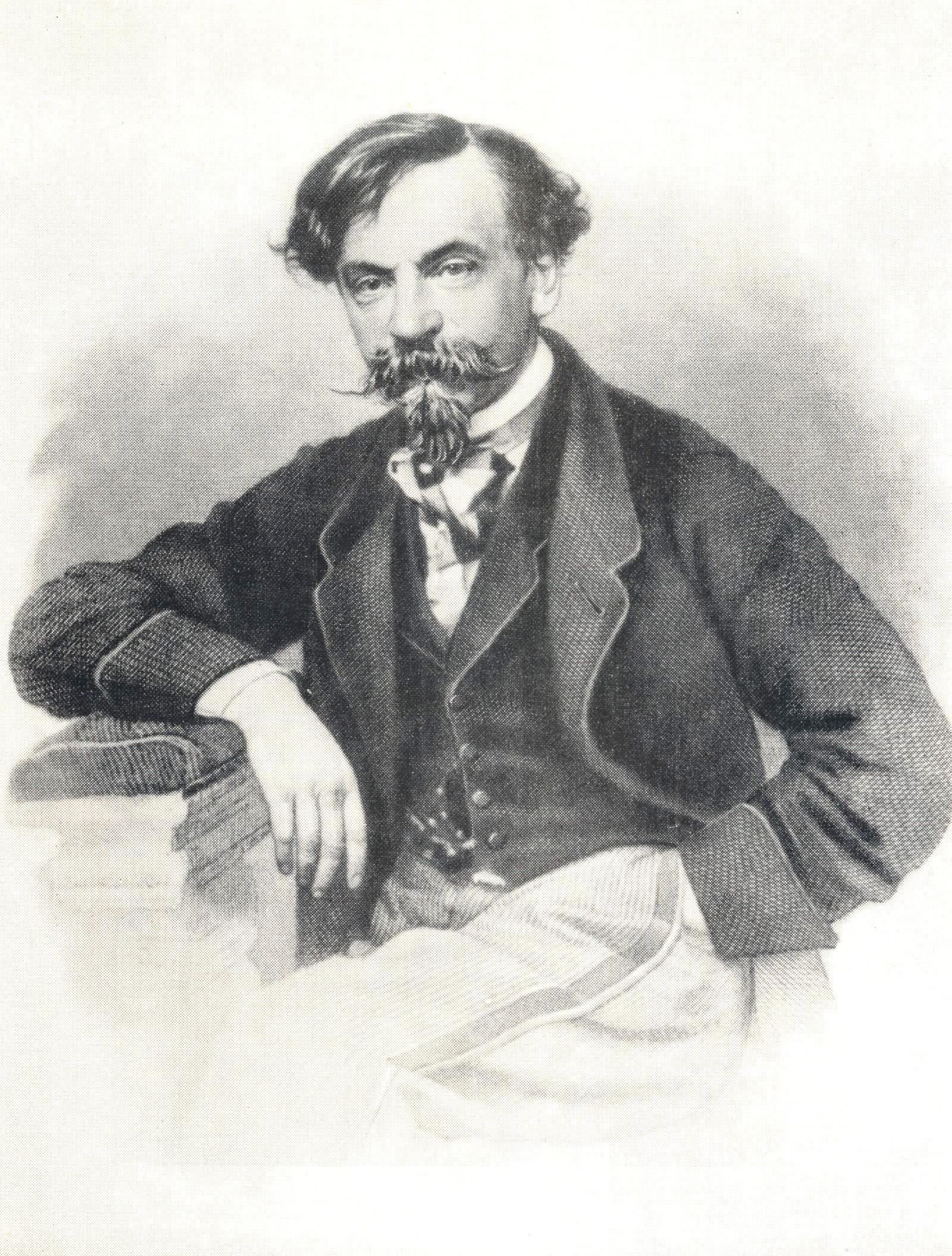 Portrait of russian writer Ivan Panaev = Иван Иванович Панаев (1812-1862), русский писатель, литературный критик, журналист